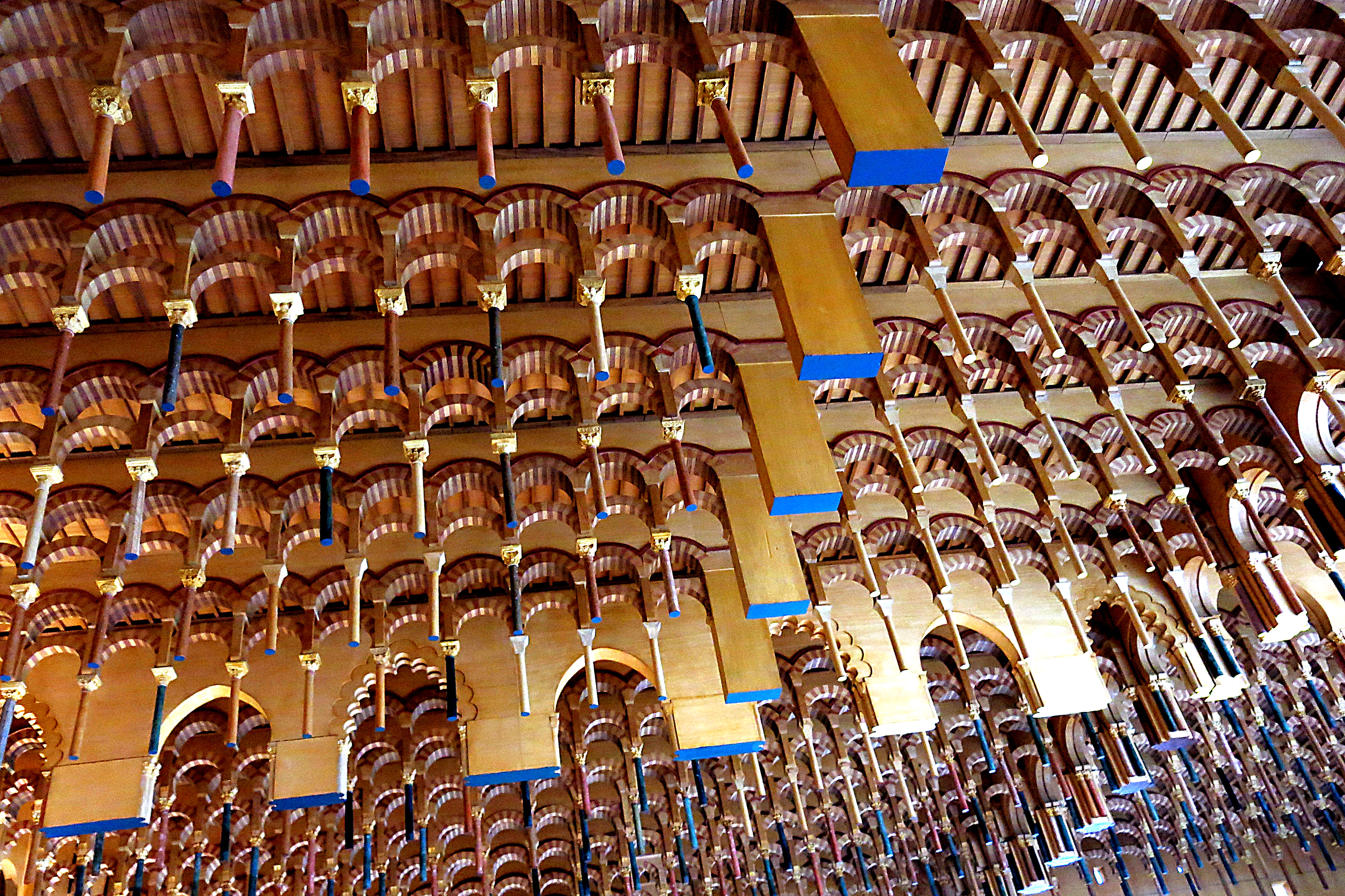 Mezquita de Córdoba vista desde abajo, maqueta del Museo Arqueológico Nacional de España.